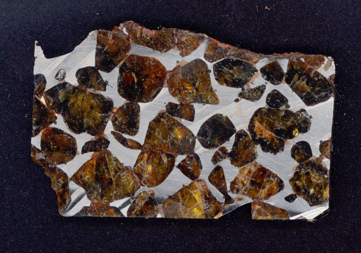 Meteorit, Pallasit; Herkunftsangabe: Pallasovka, Volgograd, Russland; Fundjahr 1990; Maße ca. 3 cm x 5 cm, mit erkennbarer Schmelzkruste oben